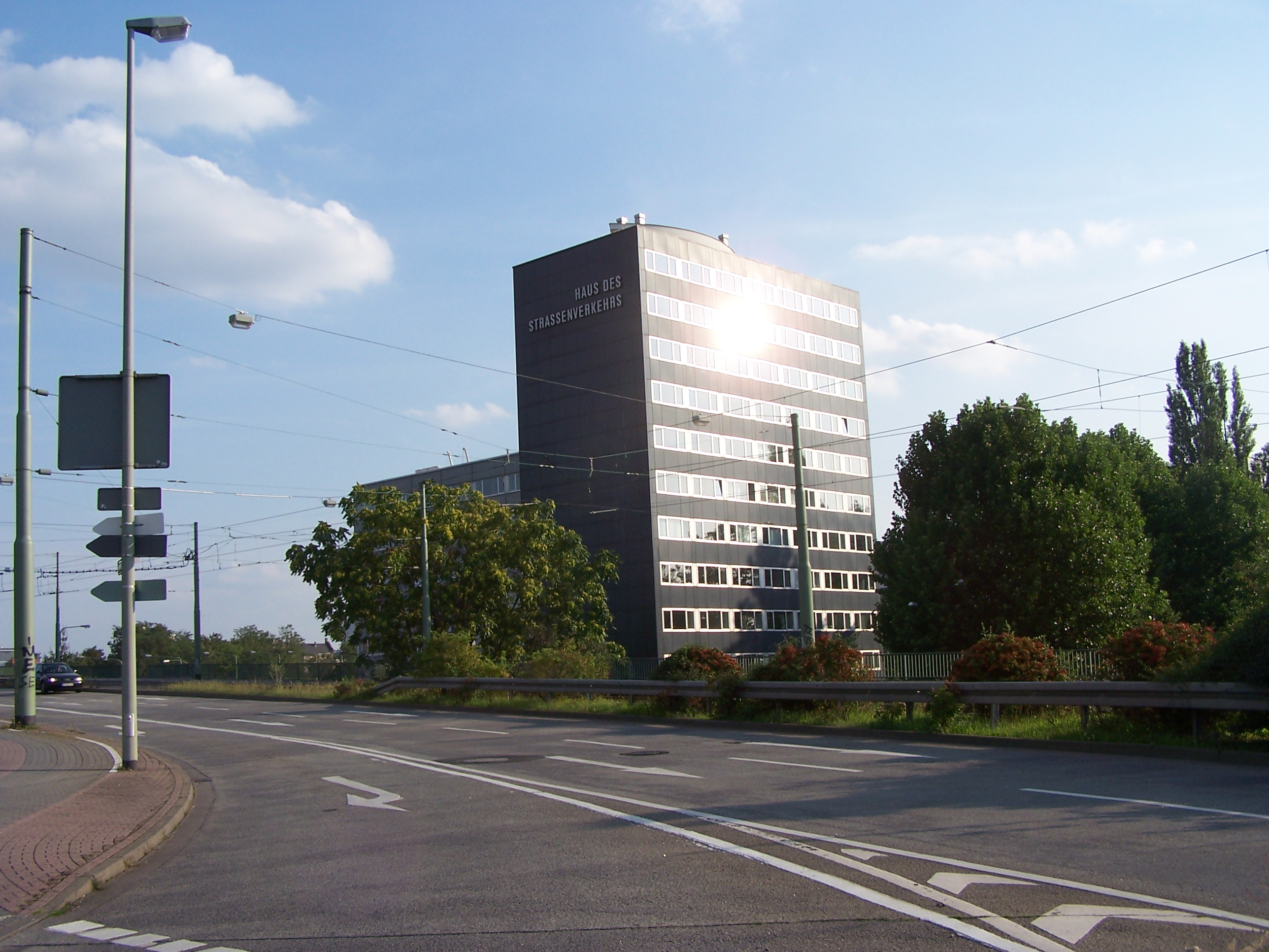 Haus des Straßenverkehrs der SVG Bundes-Zentralgenossenschaft Straßenverkehr eG, Breitenbachstraße 1 an der Breitenbachbrücke.